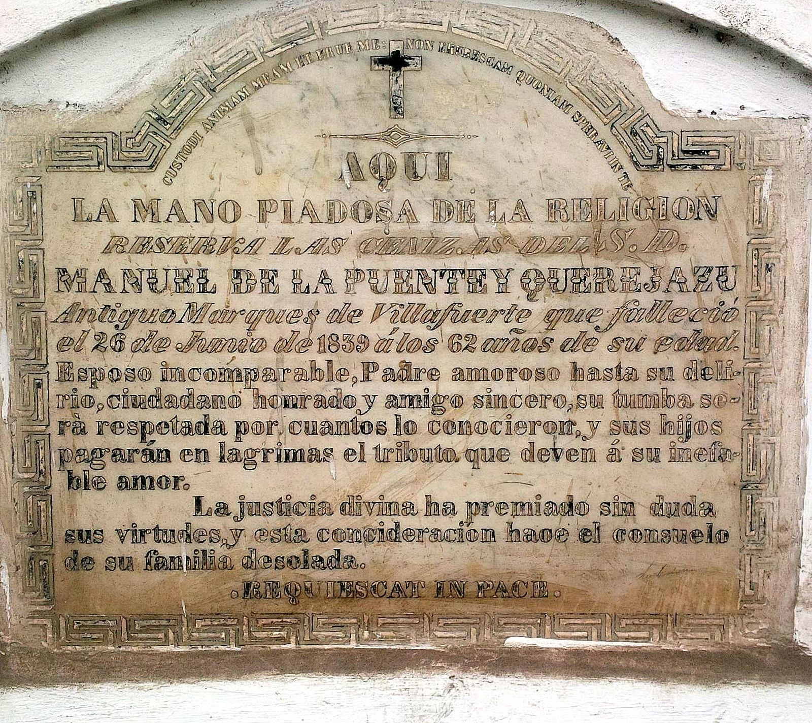 Lapida de don Manuel de la Puente Querejazu en el cementerio Presbítero Maestro, Lima. Departamento de San Cristobal, C-9. Reza: Custodi animam meam et brue me: non erubescam quoniam speravi in te. Aquí la mano piadosa de la religión reserva las cenizas del s.d. Manuel de la Puente y Querejazu, antiguo marqués de Villafuerte que falleció el 26 de junio de 1839 a los 62 años de edad. Esposo incomparable, Padre amoroso hasta su delirio, ciudadano honrado y amigo sincero. Su tumba será respetada por cuantos lo conocieron, y sus hijos pagaran en lágrimas el tributo que deven a su inefable amor. La justicia divina ha premiado sin duda sus virtudes y esta consideración hace el consuelo de su familia desolada. Requiescat in pace.